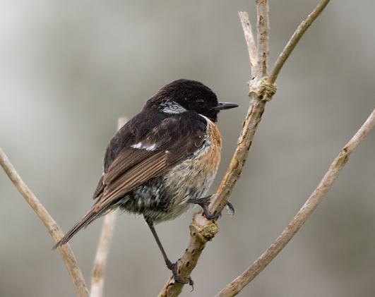 Schwarzkehlchen (Männchen)